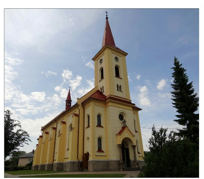 Lubina